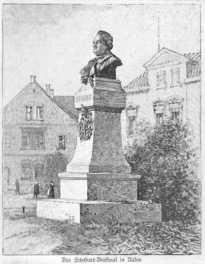 Erstes Schubart-Denkmal in Aalen (Württemberg), Holzstich, 14x10 cm.Das Original wurde 1891 vom württembergischen Hofbildhauer Ernst Curfess geschaffen. Im Rahmen der sogenannten Metallspende des deutschen Volkes während des Zweiten Weltkriegs wurde die Bronzebüste im Jahr 1942 eingeschmolzen.1950 erhielt der Künstler Hugo Buchner den Auftrag, eine möglichst originalgetreue Nachbildung der ursprünglichen Plastik anzufertigen. Diese Kopie ist heute Hauptbestandteil einer modernen Skulptur vor dem Aalener Bahnhof in Edelrost Design, bestehend aus einem Rahmen und einem Sockel, der die Büste trägt.